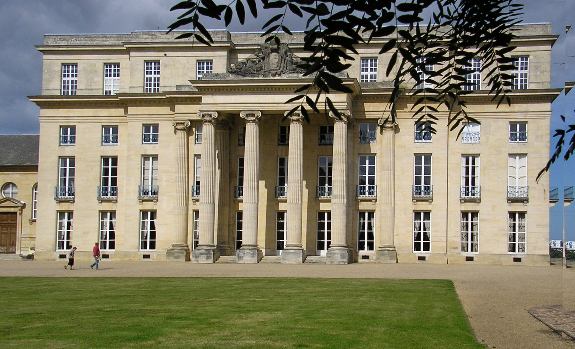 Bénouville (France - Région Normandie - Dép. du Calvados) — Façade du château de Bénouville. Construction entre 1765 et 1785. Architecte : Claude Nicolas Ledoux. Style Néoclassique.